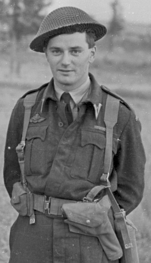 Bildet er hentet fra Arkivverket. Norske flyvere på kontinentet Arkivinstitusjon : Riksarkivet Arkivnavn : NTBs krigsarkiv Sted : UKJENT LAND, 00 Ukjent, 00 Ukjent, Emneord: Andre verdenskrig Avbildet